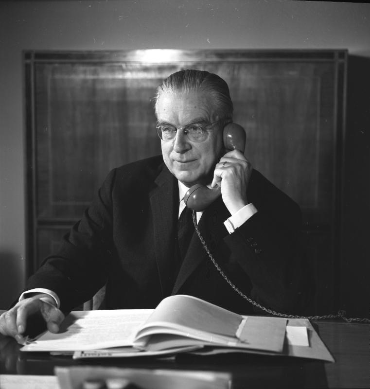 Portraitaufnahmen von Staatssekretär Globke